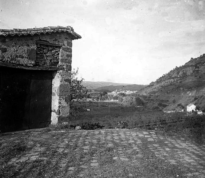 Martorell des de Can Pastallé. Josep Salvany i Blanch (1919)